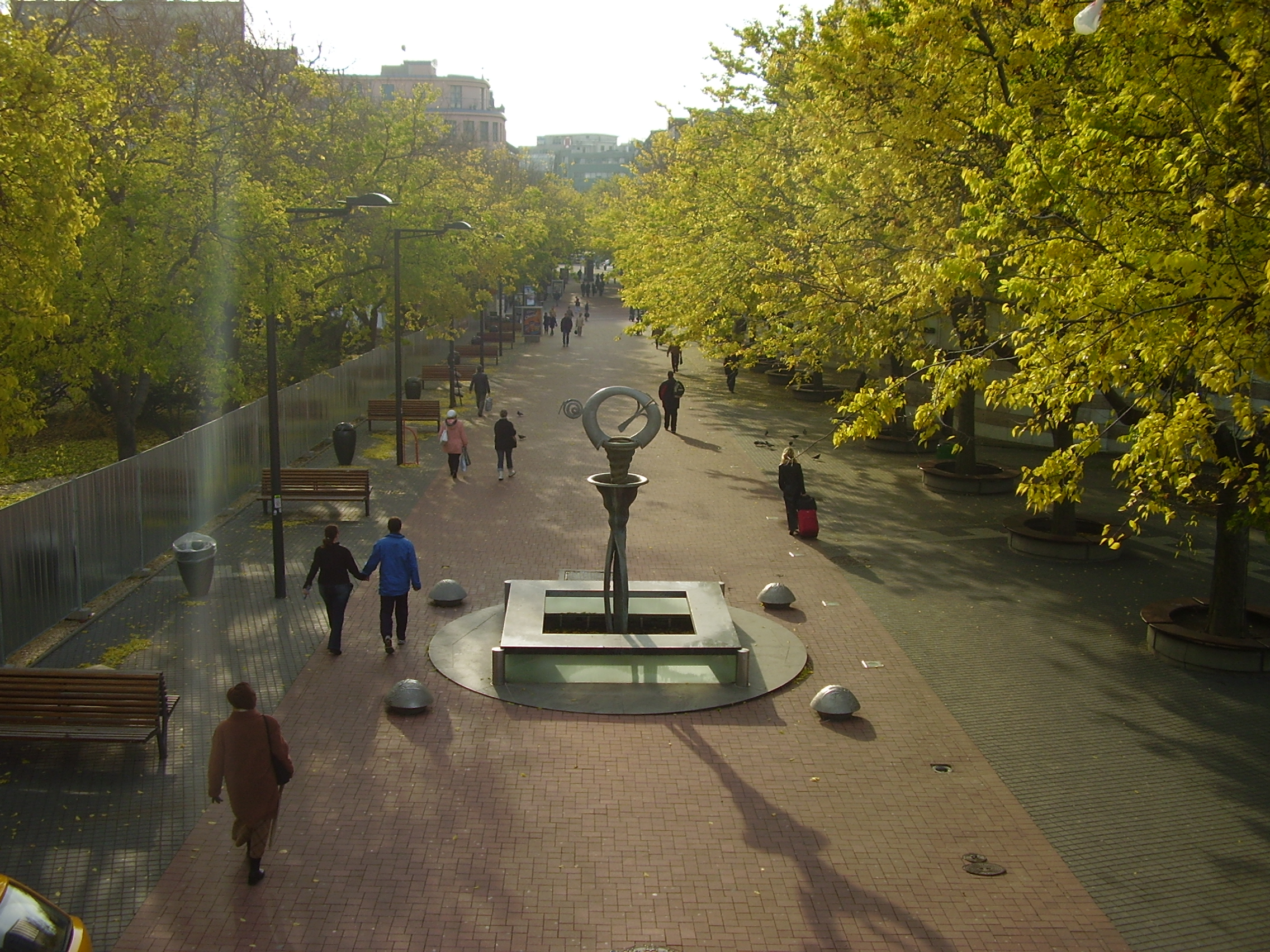 Poštová street, Old Town, Bratislava